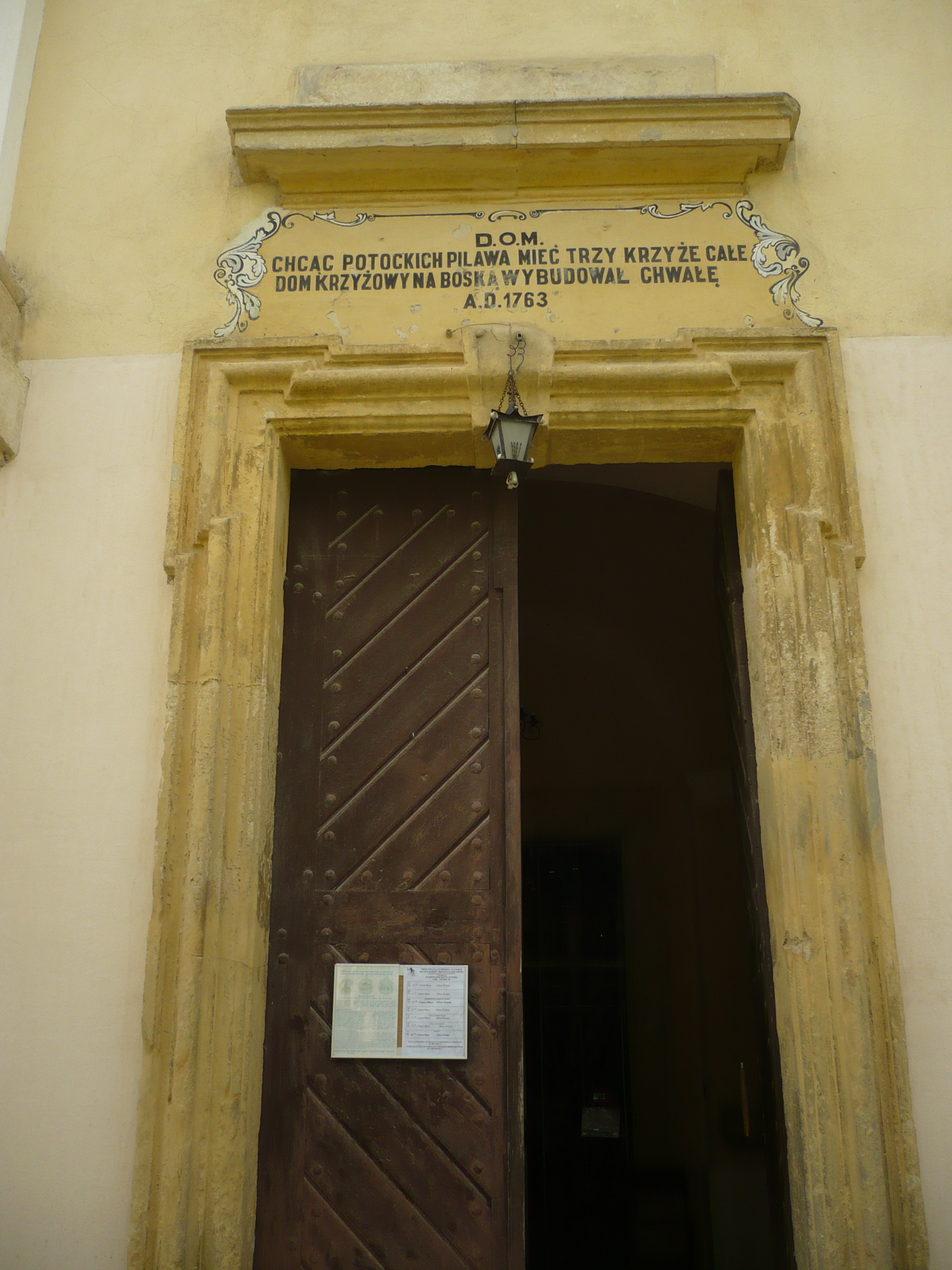 Buczacz. Kościół Wniebowzięcia NMP